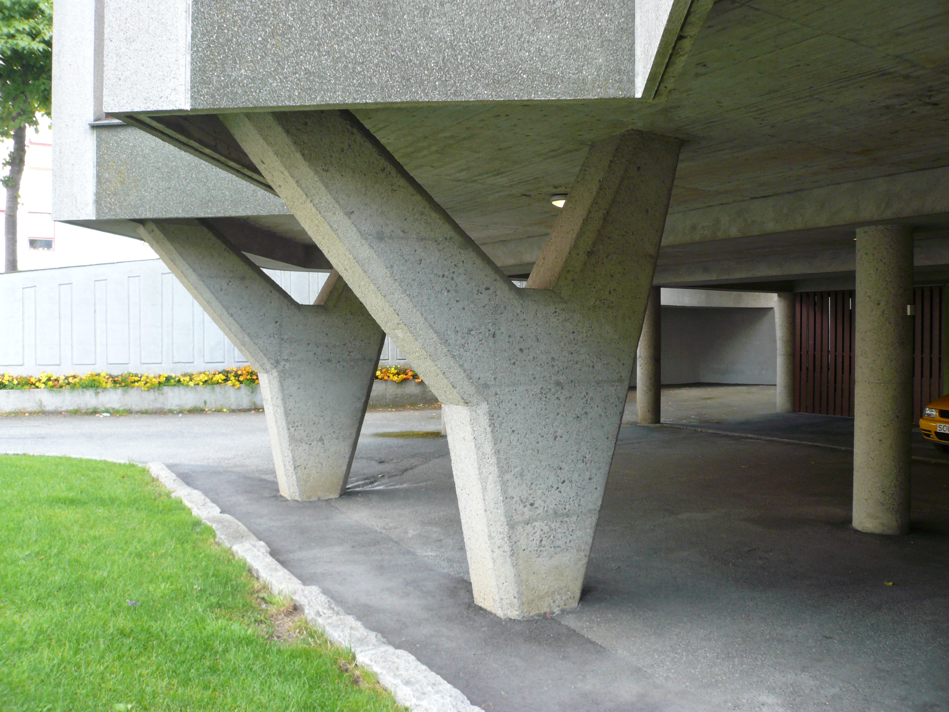 Mot gaten står biblioteket på y-formede pilarer.